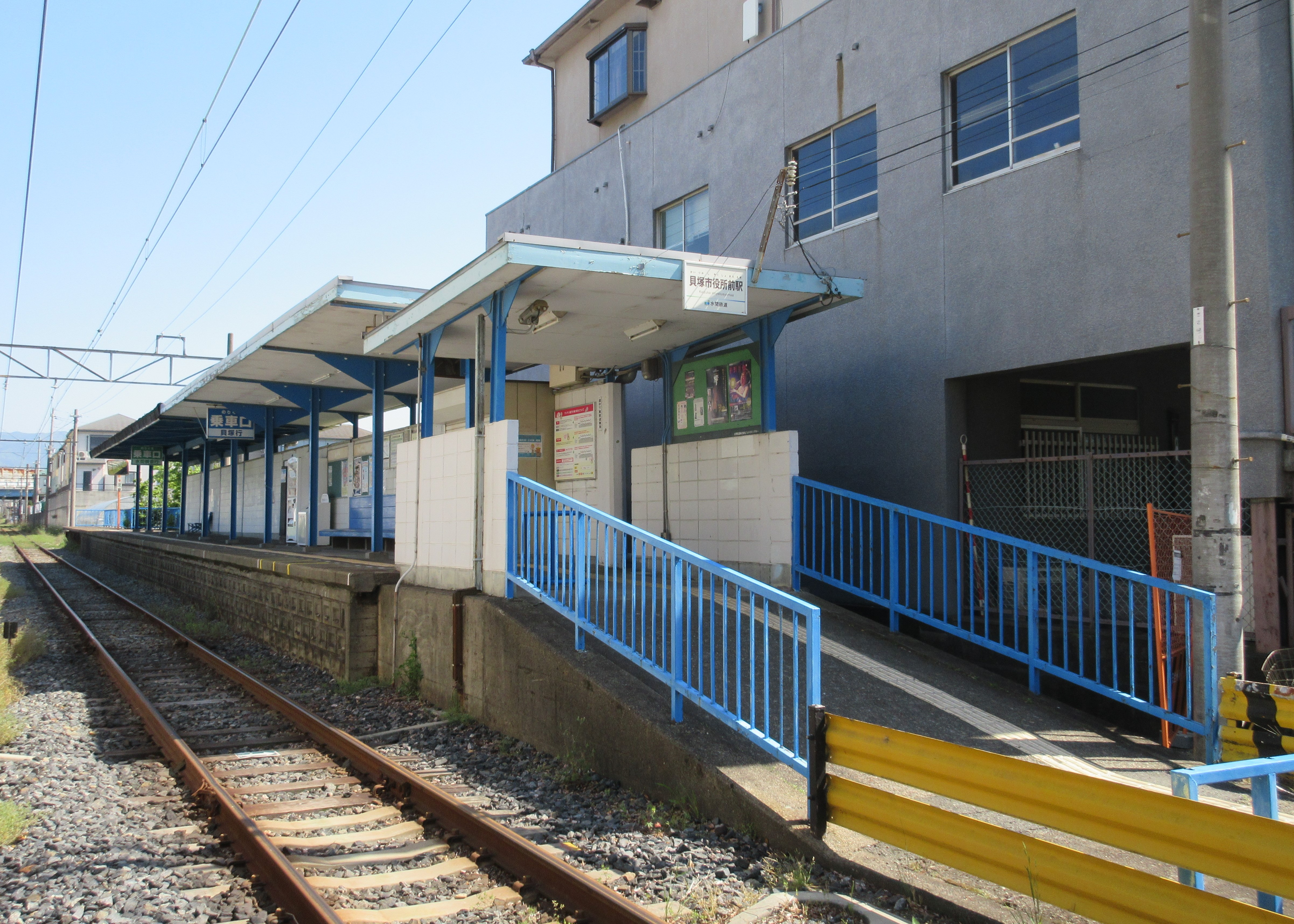 水間鉄道貝塚市役所前駅